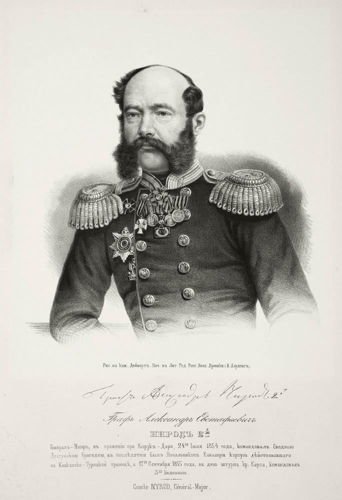 генерал А. Е. Нирод